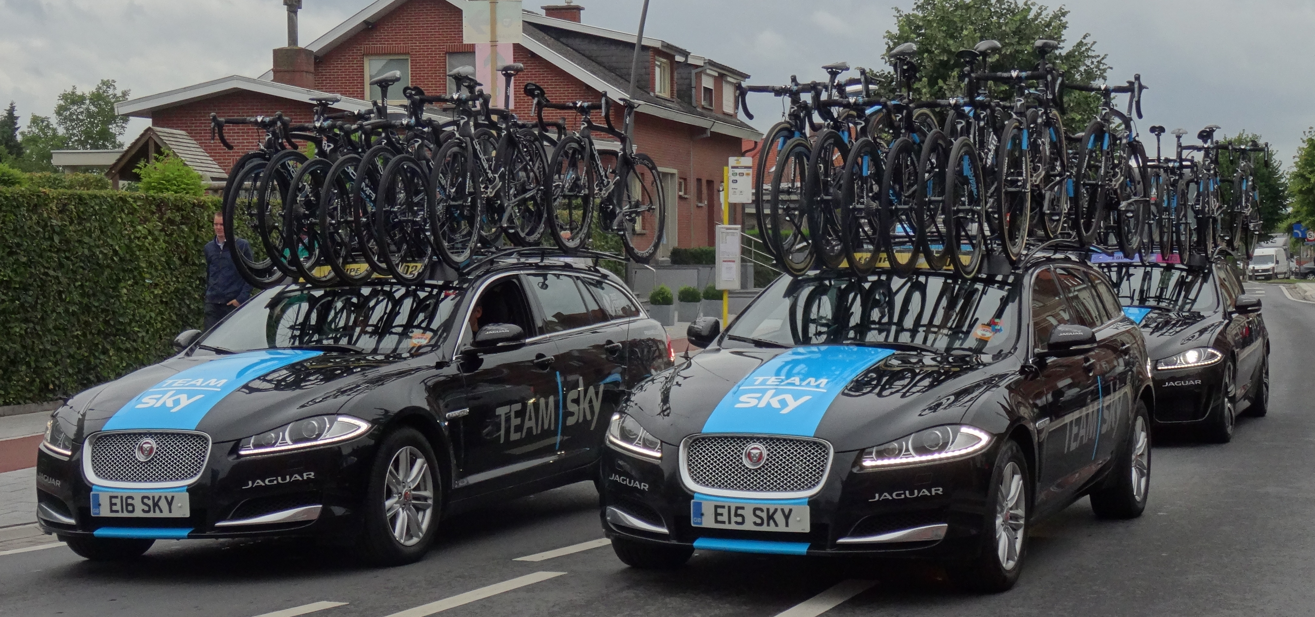 Reportage photographique réalisé le mercredi 9 juillet à l'occasion du départ de la cinquième étape du Tour de France 2014 à Ypres, Belgique.